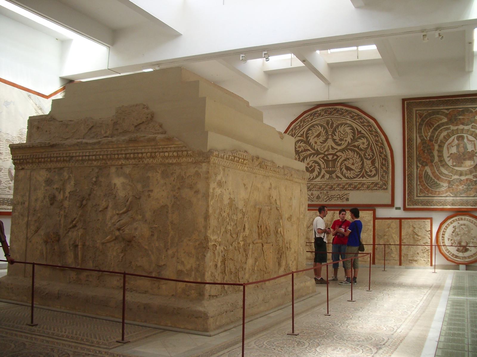 Mausolée de stuc et de plâtre des officiales. Musée du Bardo, Tunis